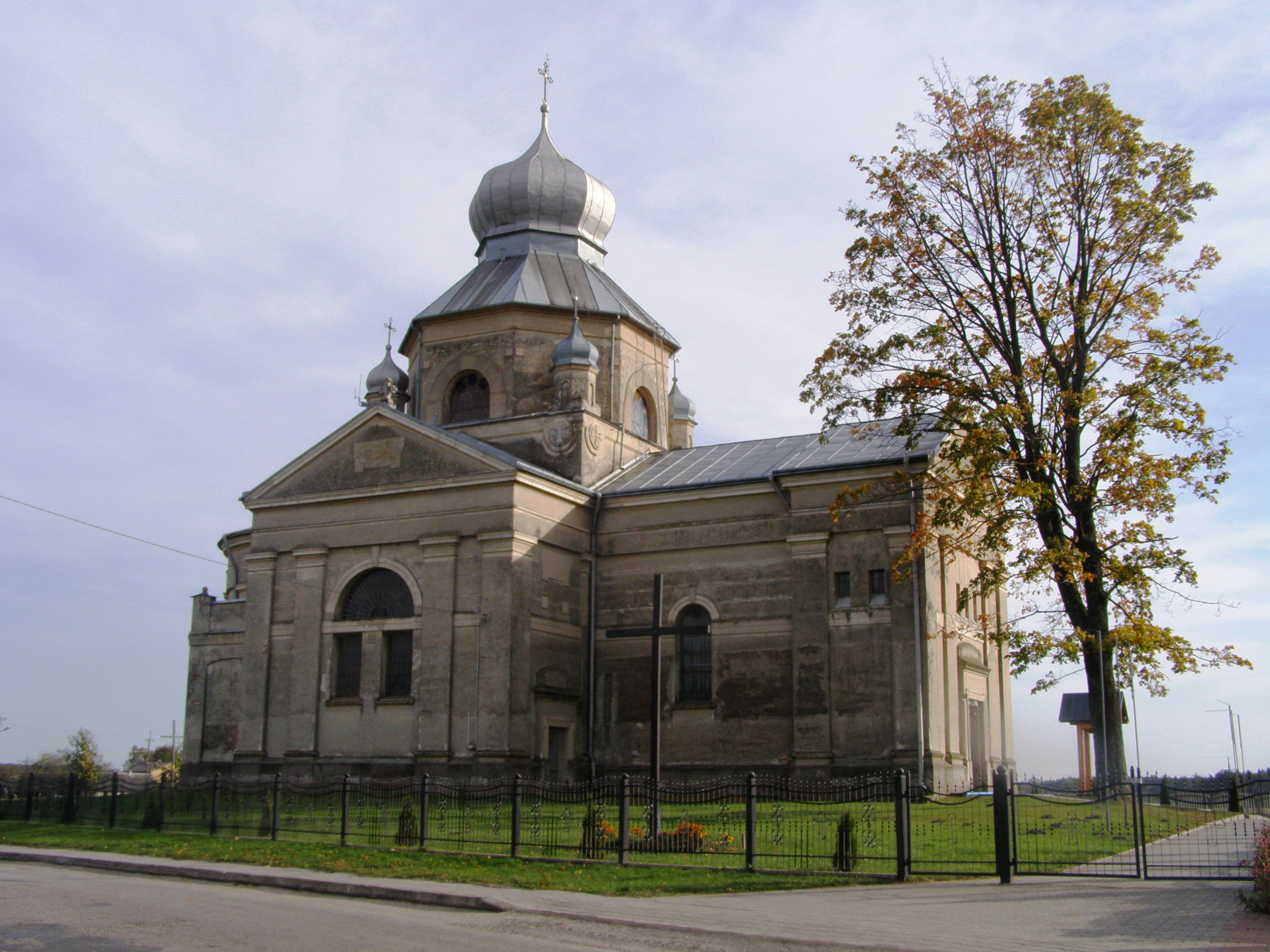 Żurawce - dawna cerkiew greckokatolicka, obecnie kościół rzymskokatolicki pw. Podwyższenia Krzyża Świętego, 1912 (zabytek nr rejestr. A/867 z 3.07.2008)